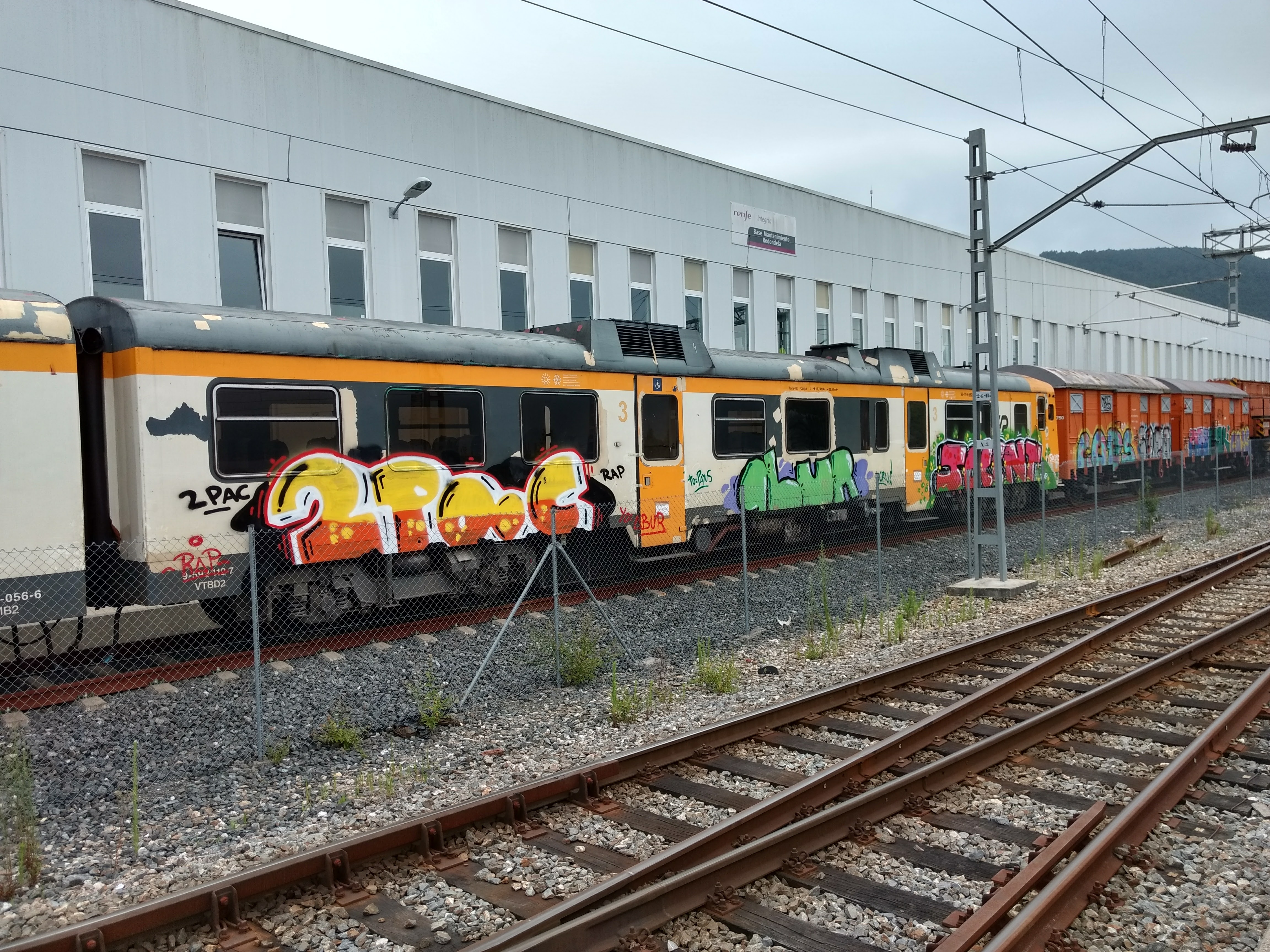 Fotografía del tren accidentado en los talleres de Redondela de Galicia (Redondela, Pontevedra). Puede verse el cartel judicial en la puerta del tren.